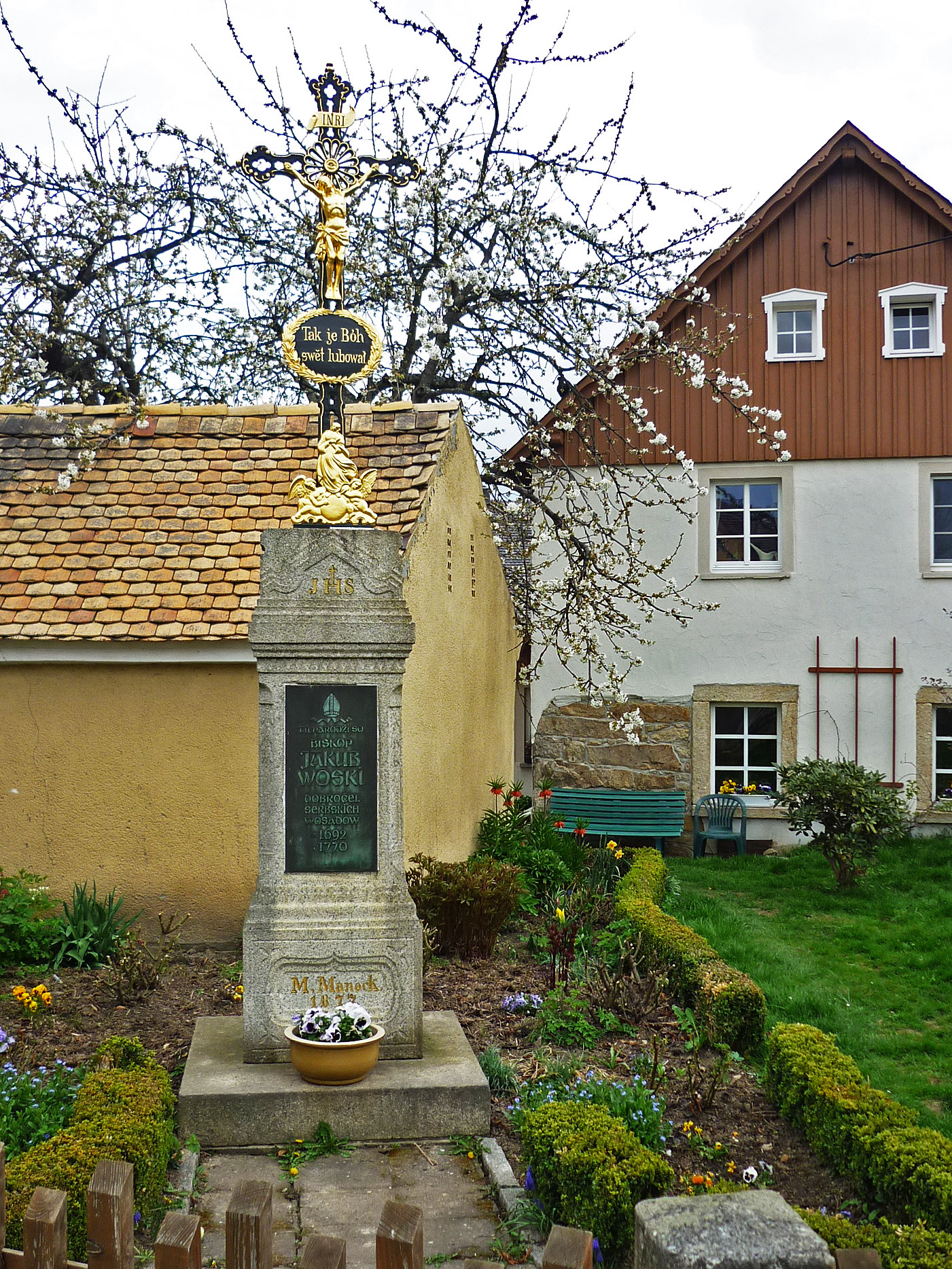 Wegkreuz in Crostwitz Nr. 25